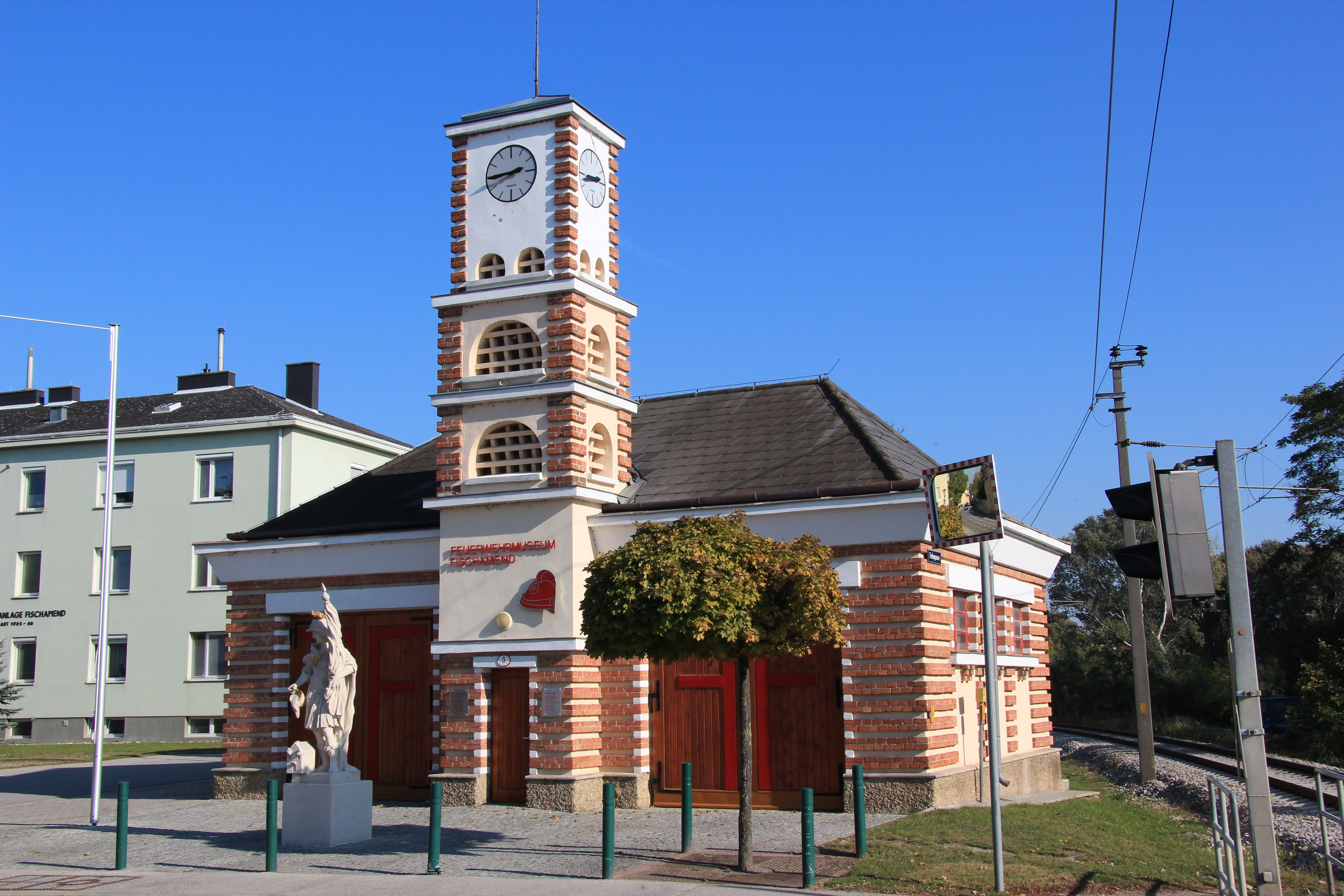 ehemaliges Feuerwehrgebäude in Fischamend, heute Feuerwehrmuseum